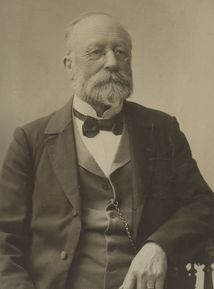 Karl Albrecht von Ritter (1836–1917), Regierungsdirektor in Speyer, Gründer des Pfälzerwald-Vereins